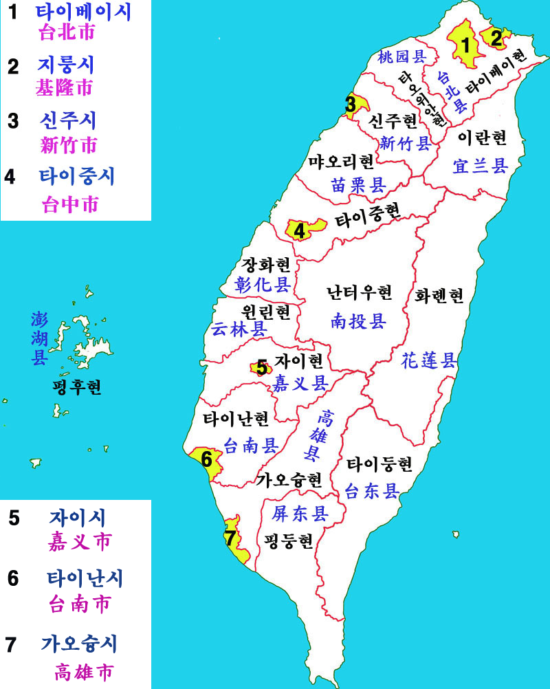 타이완성 행정구역도